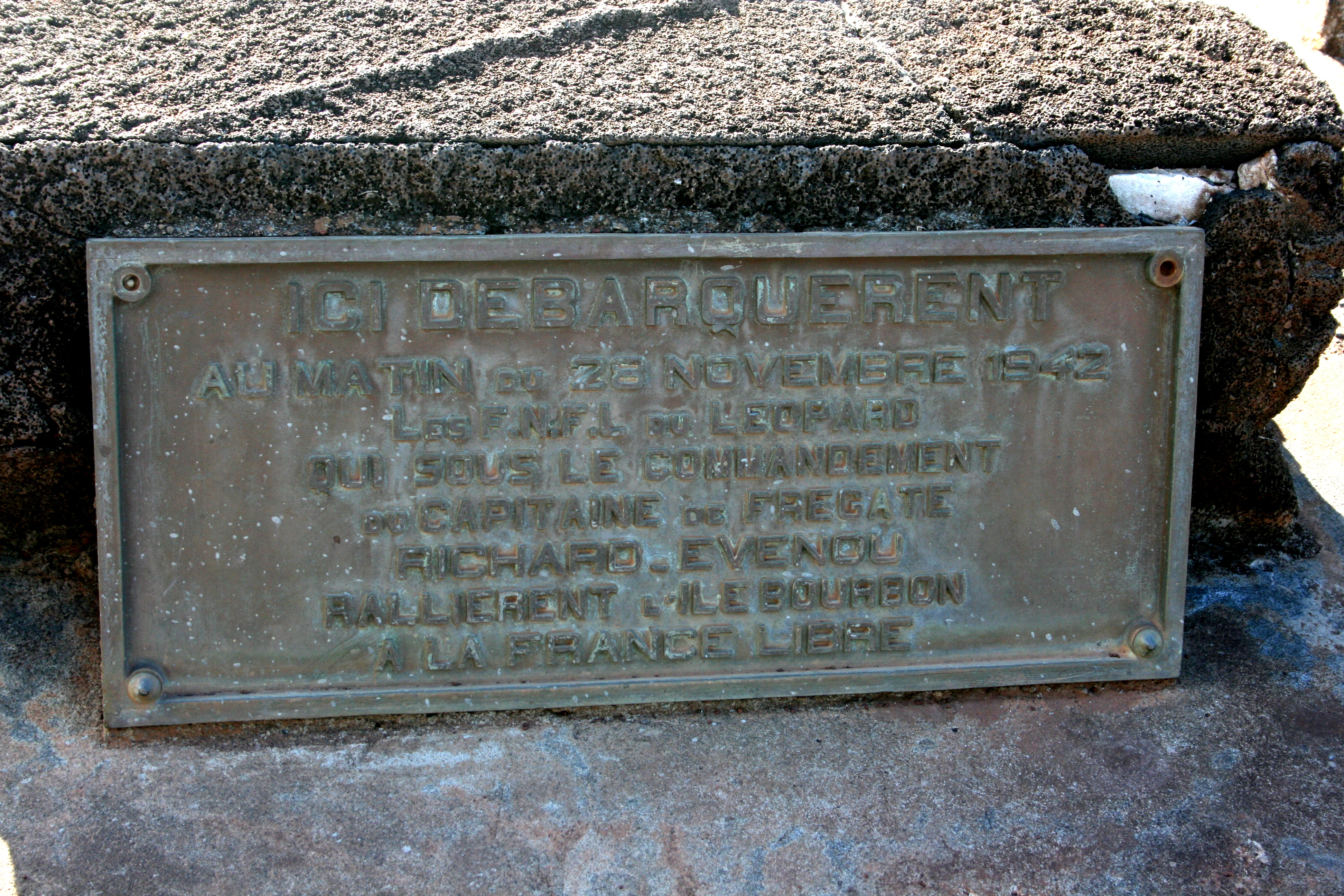 Plaque rappelant le débarquement au Barachois deSaint-Denis de la Réunion en novembre 1942